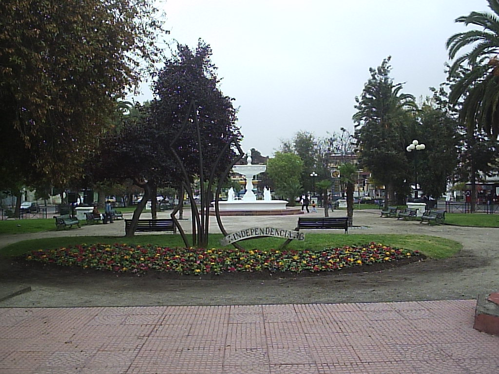 Plaza Chacabuco Autor:Alstradiaan Alstradiaan Blog Fecha:Mayo de 2005 Fotografía tomada con una cámara digital Olympus camedia D-395 de 3.2 megapixeles